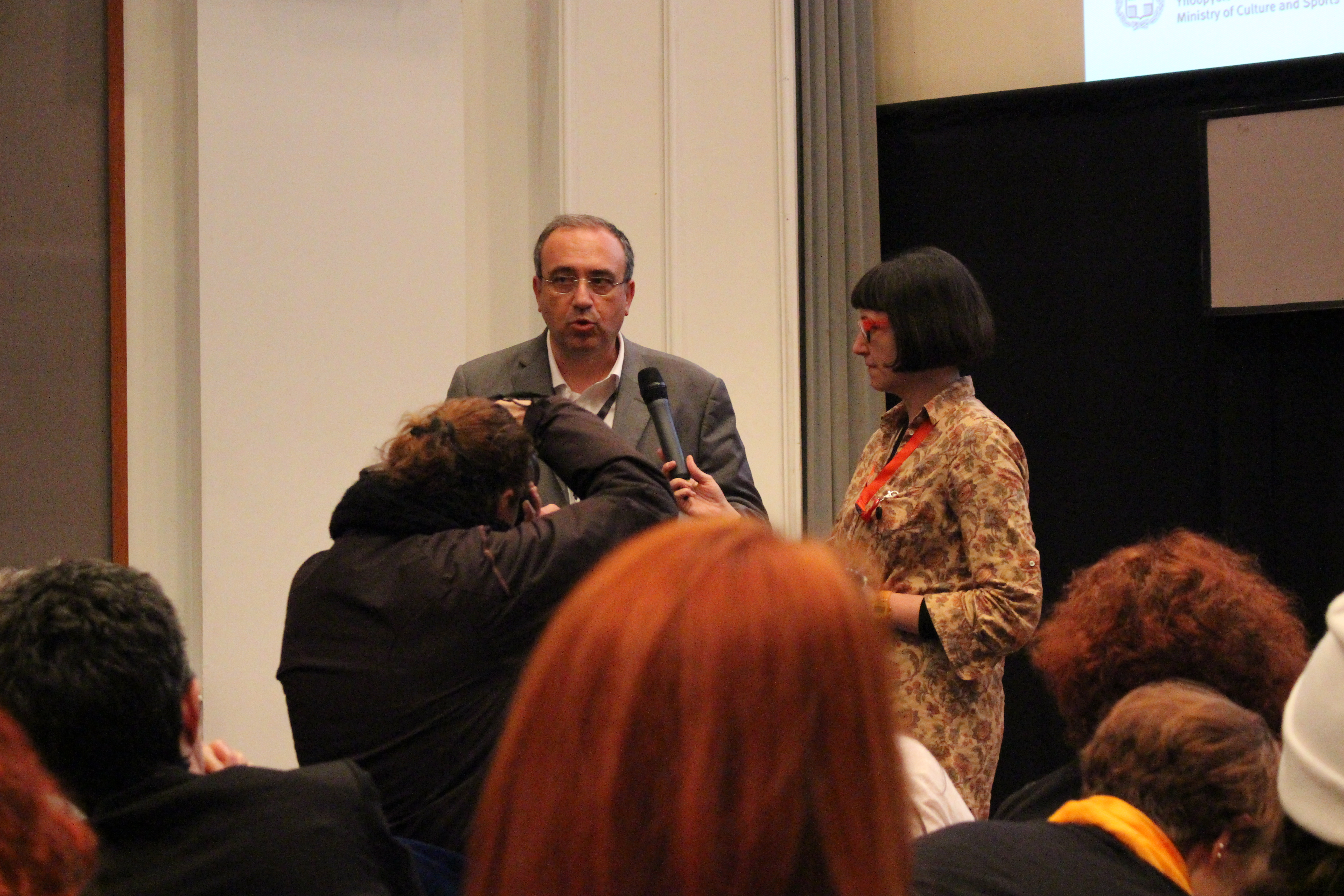 Από την πρεμιέρα της ταινίας "Η ΘΗΛΙΑ" στο 20ό διεθνές φεστιβάλ ντοκιμαντέρ Θεσσαλονίκης.